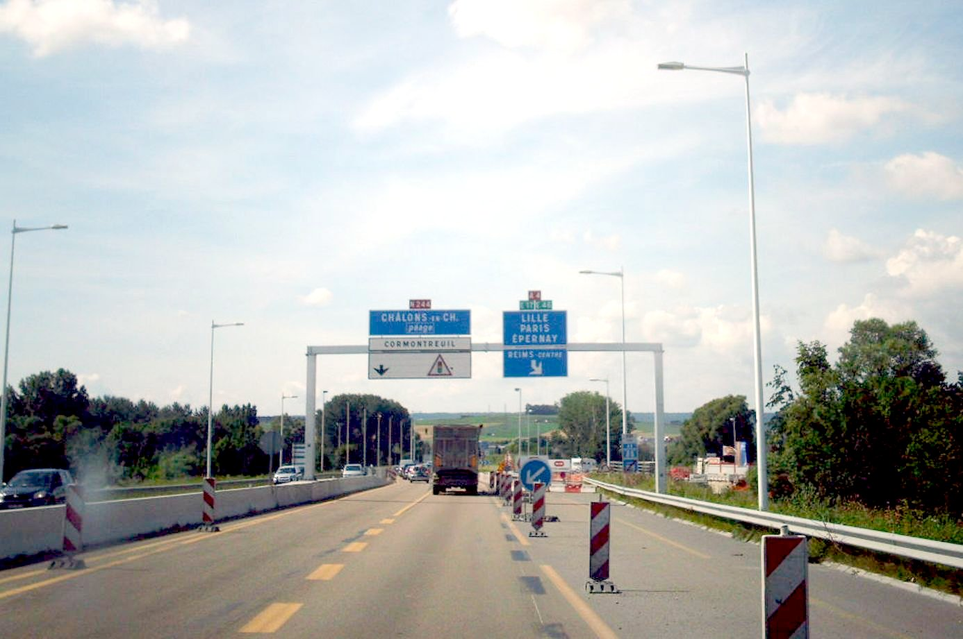 L'Autoroute Française A34 au niveau de l'échangeur de Cormontreuil avec l'Autoroute Française A4